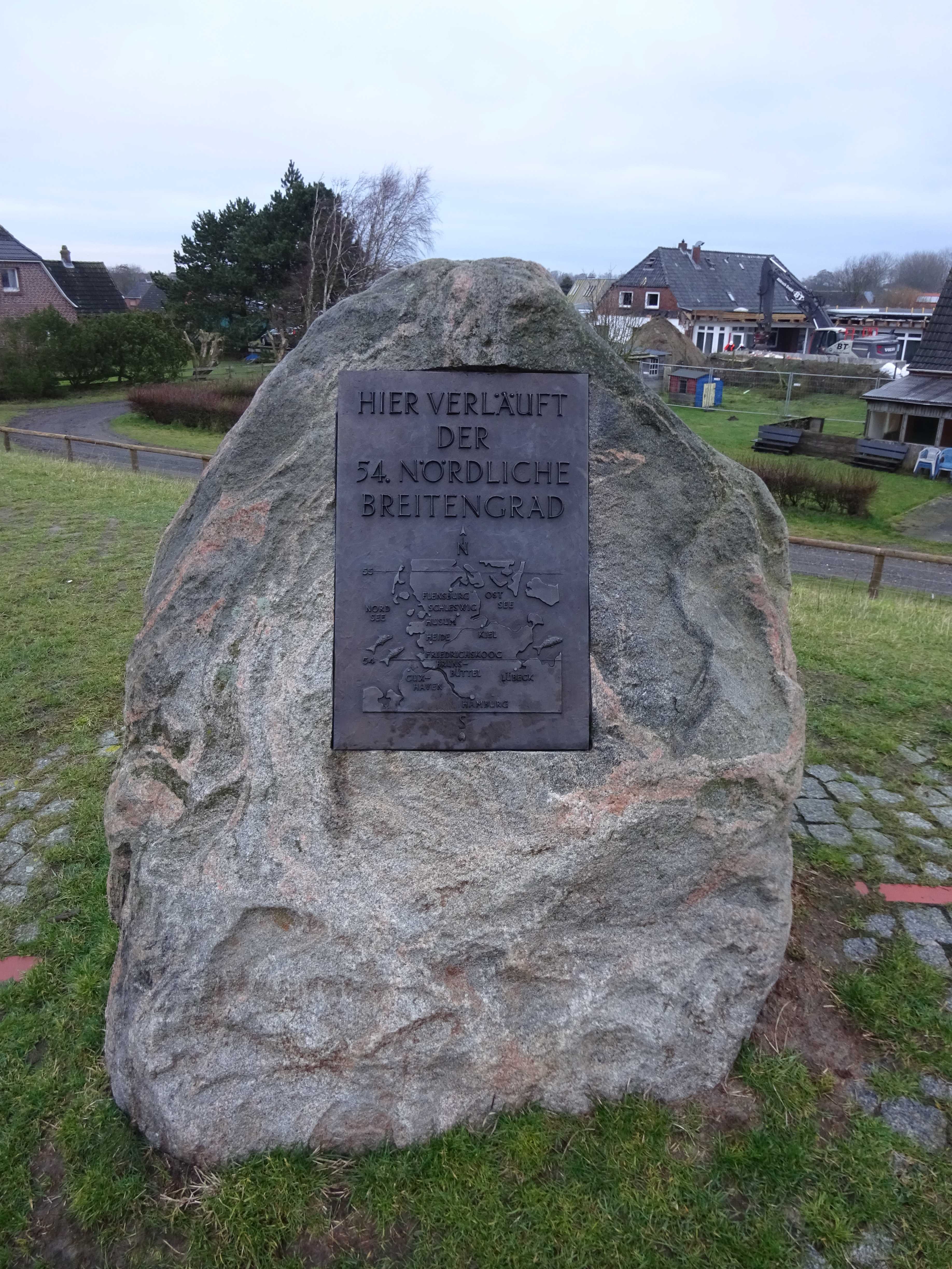 Hinweis auf den Verlauf des 54. Breitengrades nahe der Seehundstation